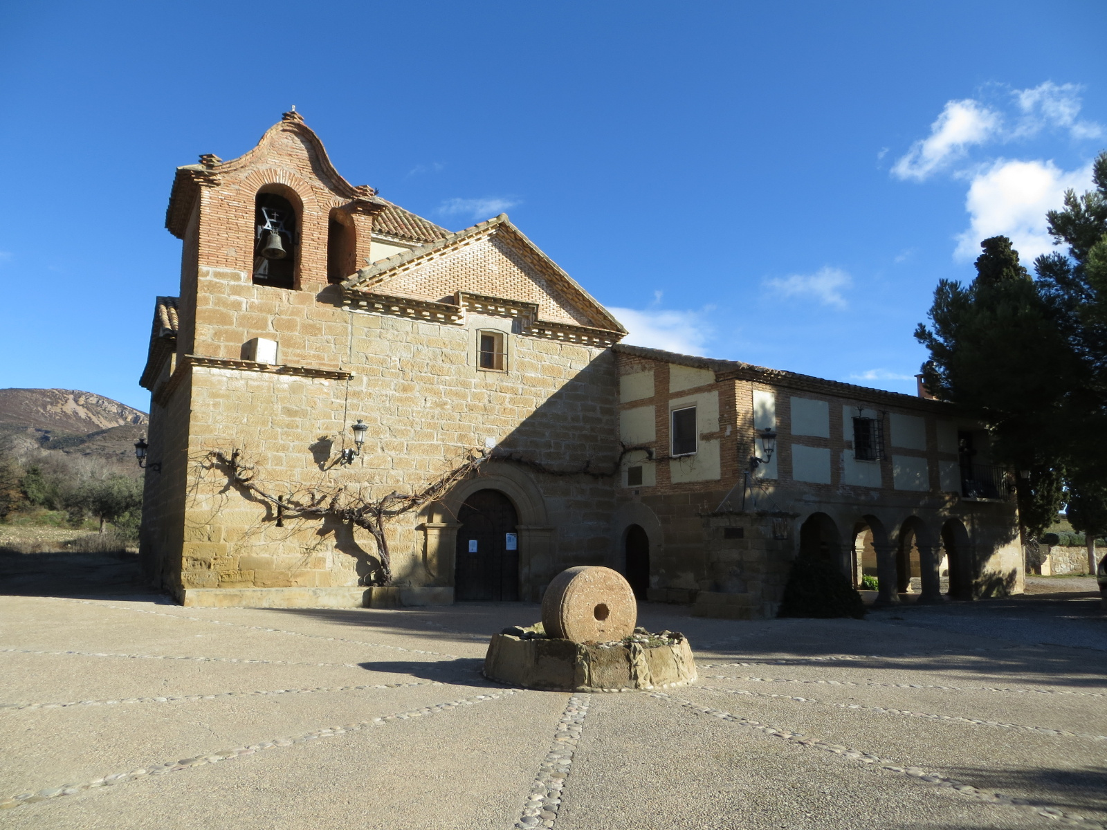 Vista de la Ermita del Viñedo de Castilsabás